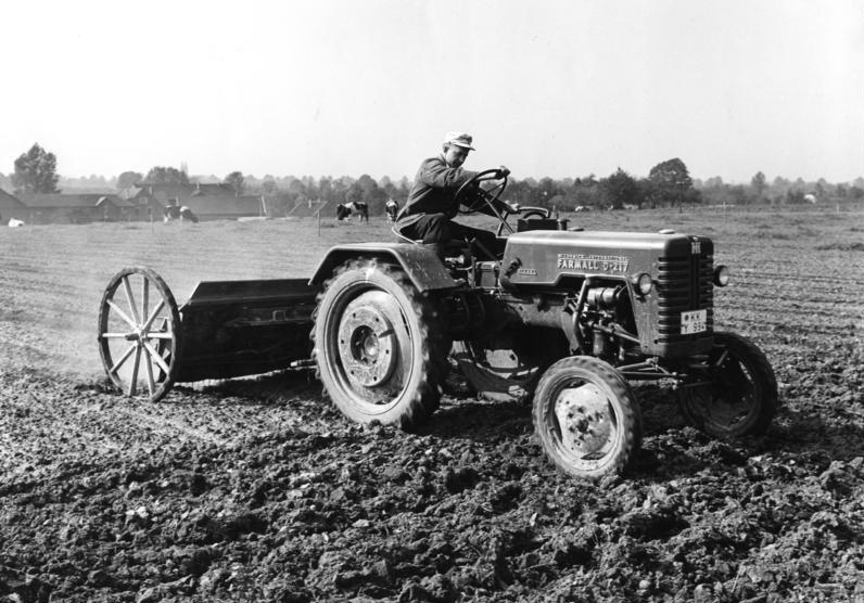 Landwirtschaftliche Aufnahmen in Lobberich bei Viersen am 20.9.1957 Jungbauer mit Düngemaschine bei der Arbeit auf dem Feld Information added by Wikimedia users.